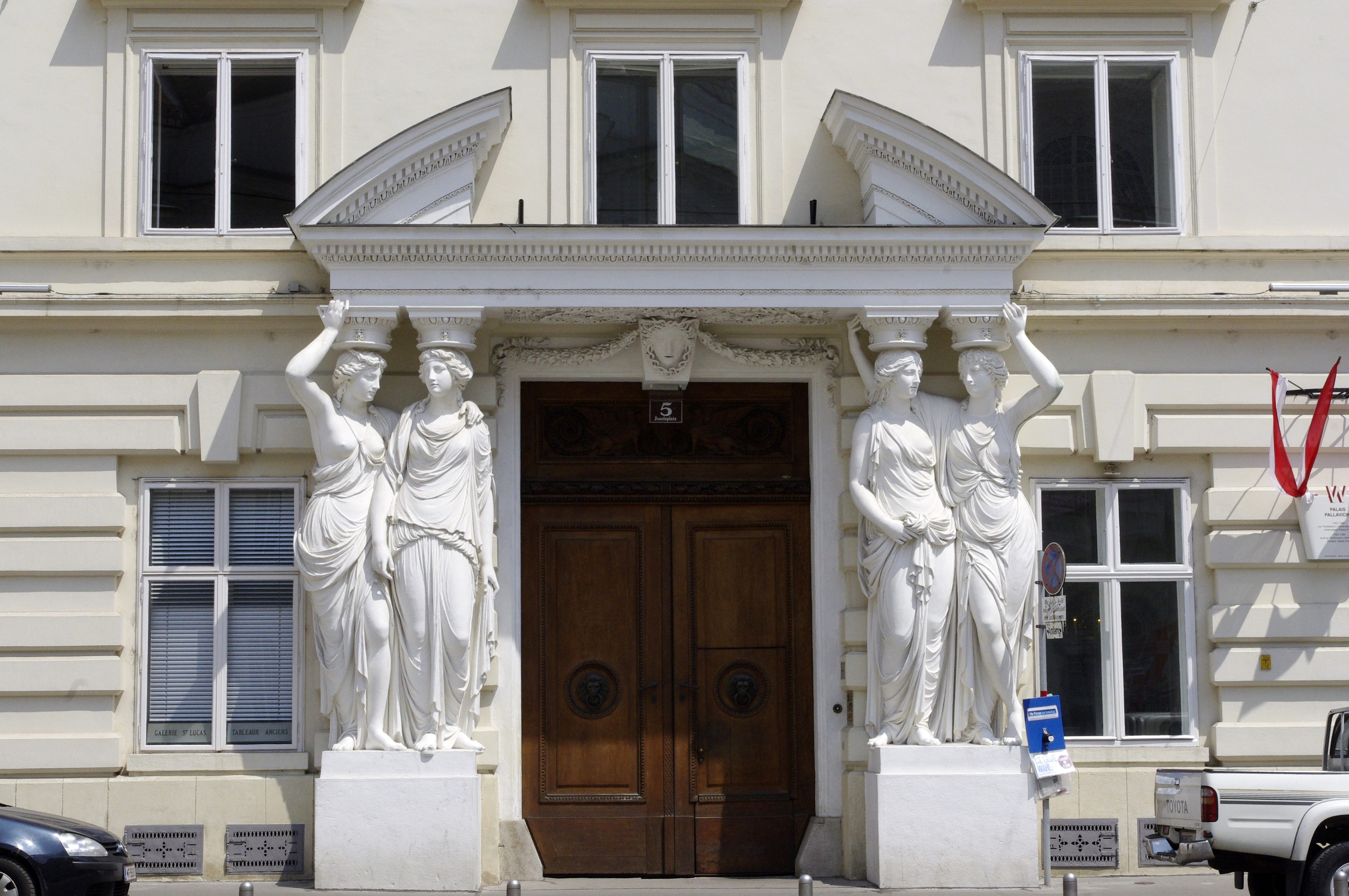 Wien - Josefsplatz, Nr 5, Palais Palavicini.